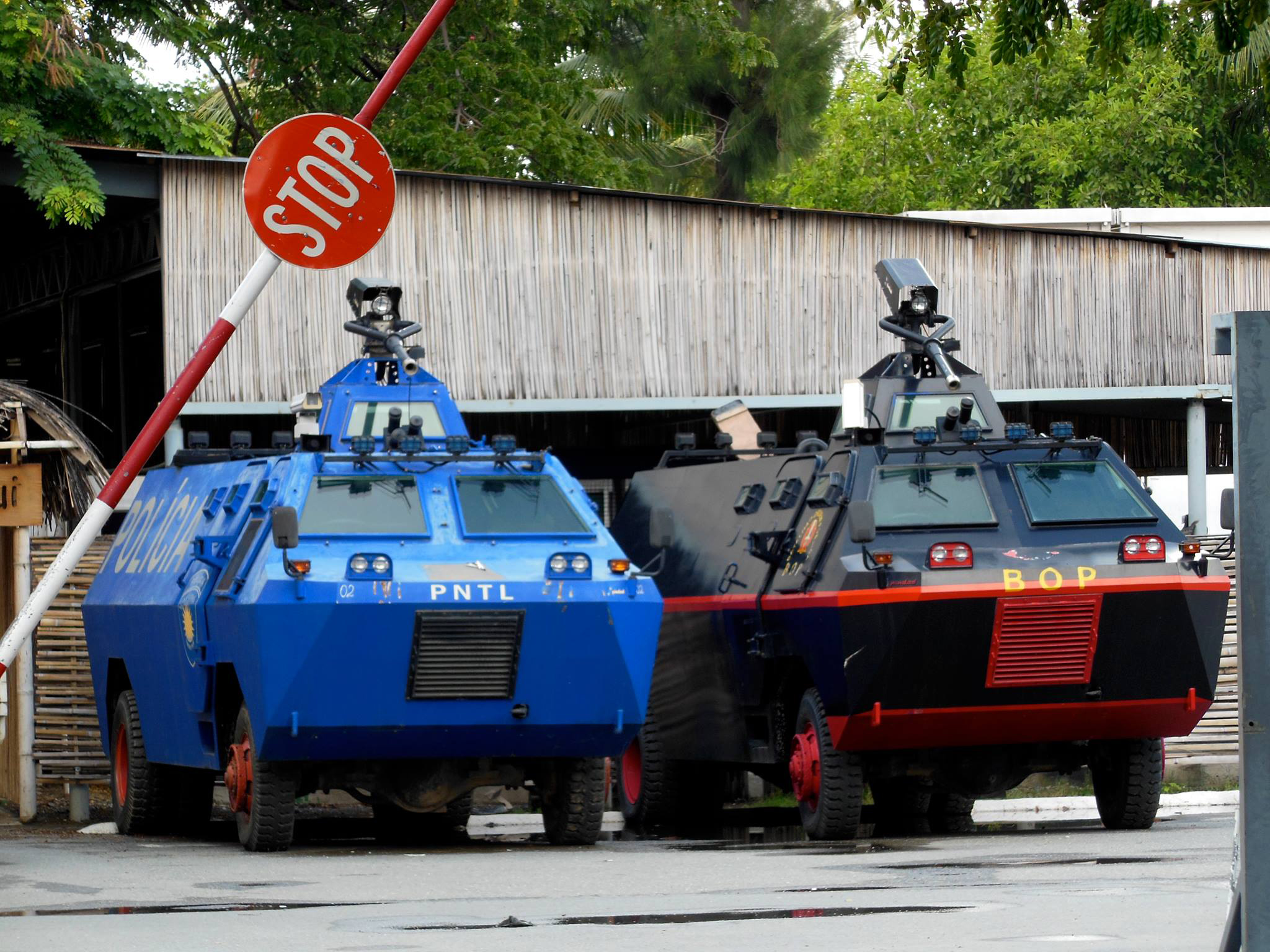 Gepanzerte Fahrzeuge der Polizei Osttimors PNTL. Das rechte Fahrzeug gehört zum Public Order Battalion BOP.